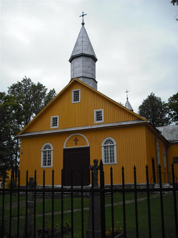 Kazliškio Švč. Mergelės Marijos bažnyčia